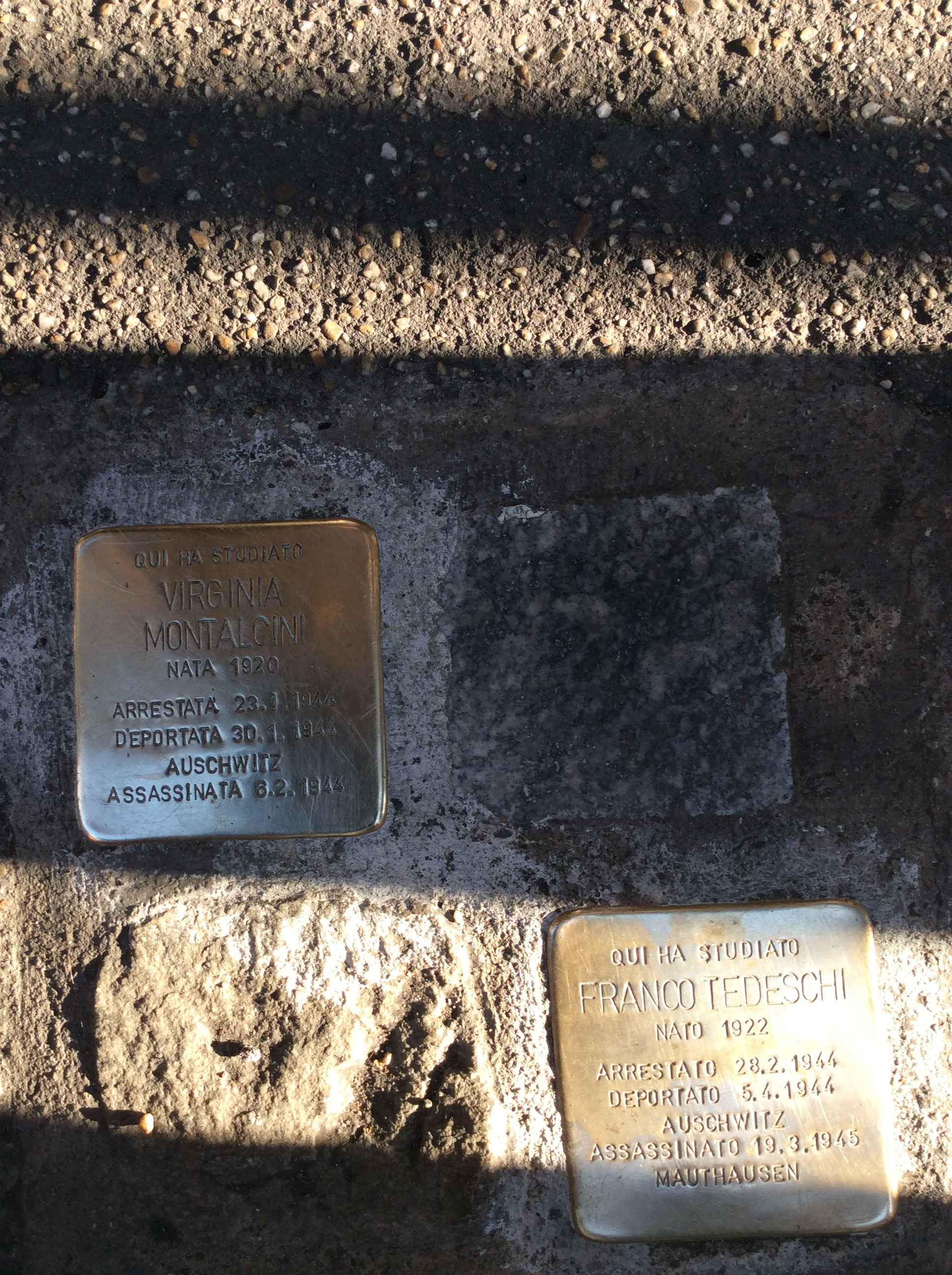 Stolperstein - Massimo D'Azeglio Liceo